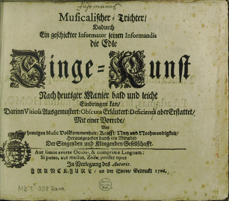 Page de titre du Musicalischer-Trichter du théoricien allemand, Martin Heinrich Fuhrmann, publié à Francfort en 1706.